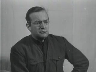 Horst Klein (* 27. Februar 1910 in Wiedenbrück) war ein deutscher Jurist und SS-Obersturmbannführer. Er wurde während der Nürnberger Prozesse angeklagt und freigesprochen.